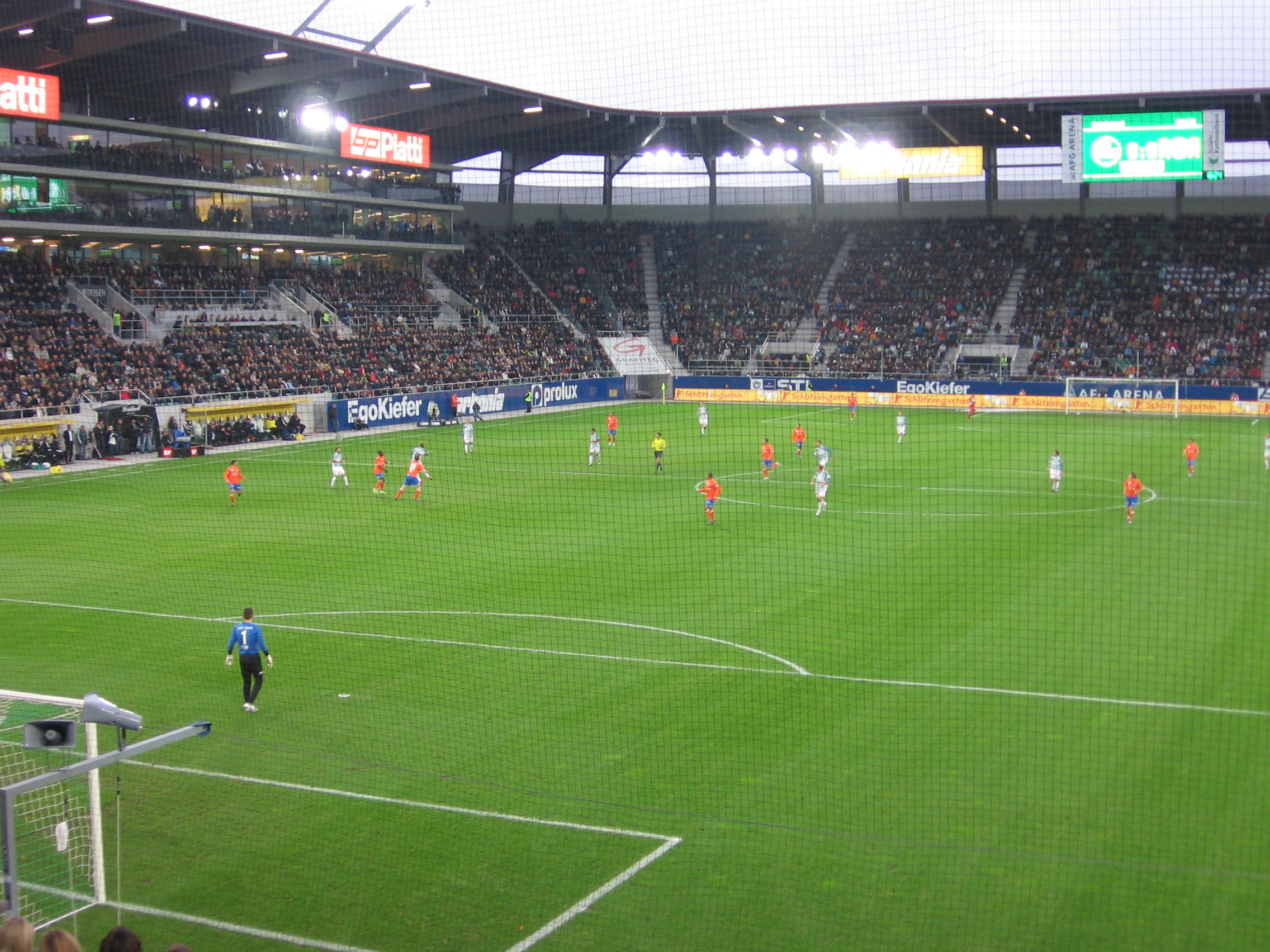 Super League-Spiel zwischen FC St. Gallen und FC Zürich in der AFG Arena (2009)